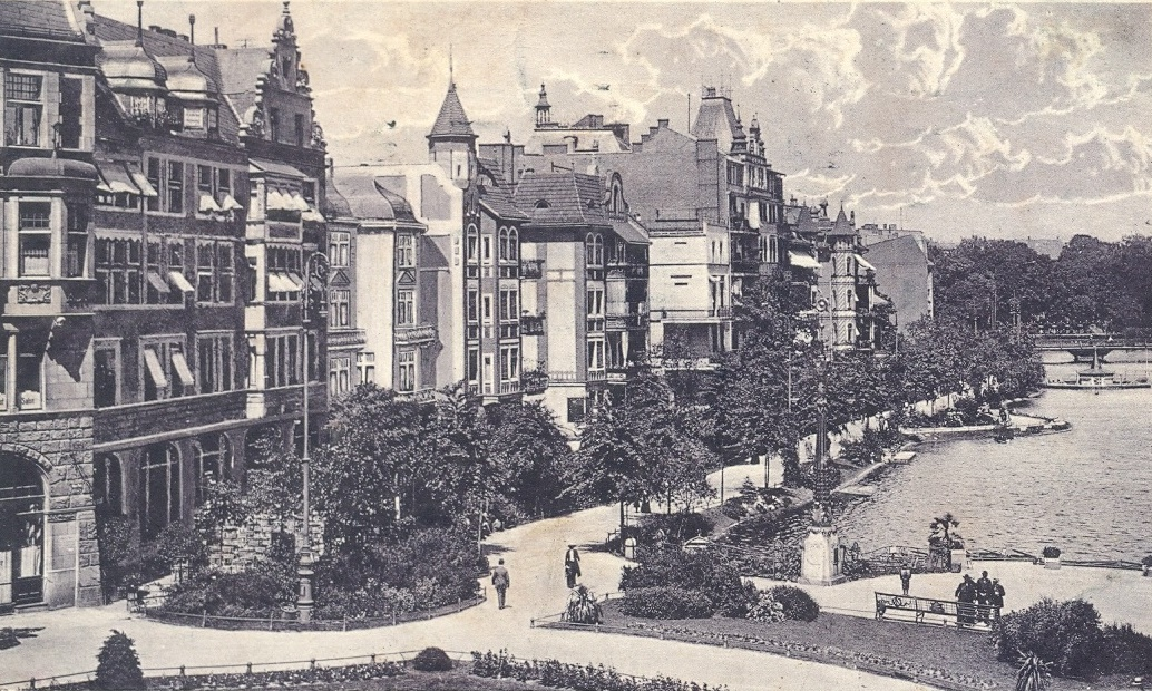 Westseite des Königsberger Schlossteichs am Münzplatz.